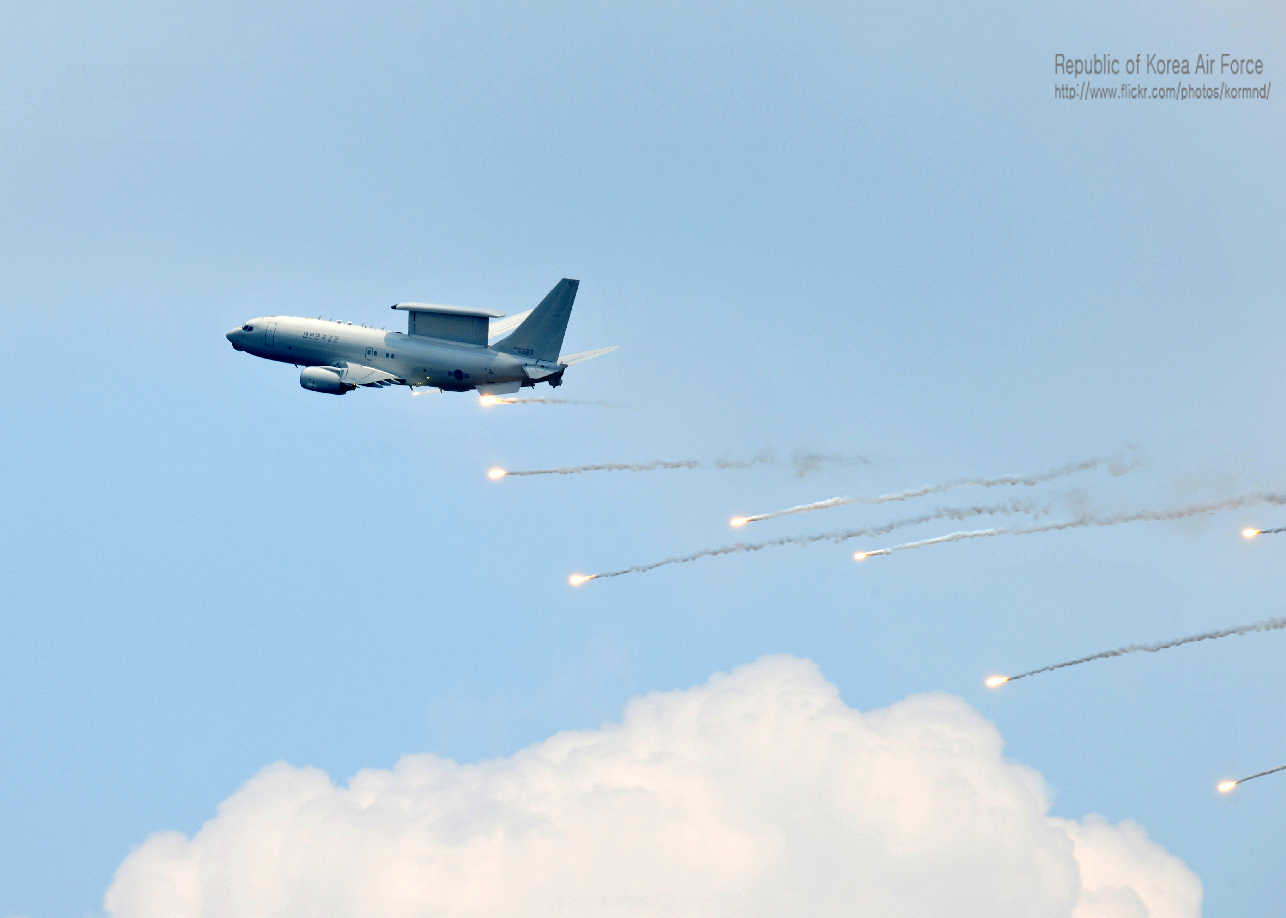 201206 포천승진 사격장 통합화력시범 훈련(1)